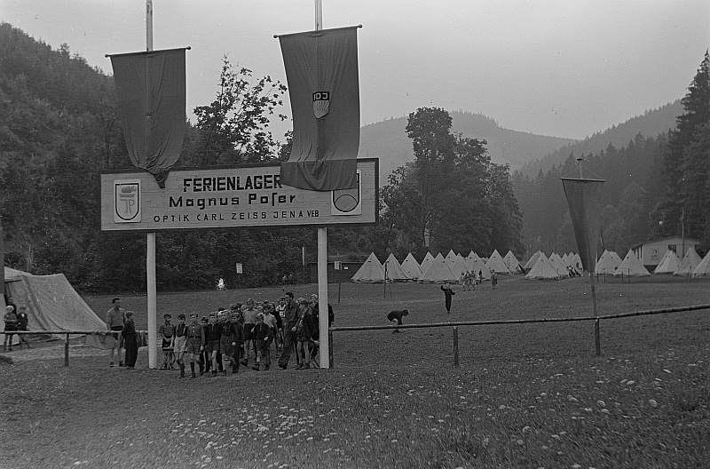 Original image description from the Deutsche Fotothek Ansicht des Lagers mit Kindergruppe